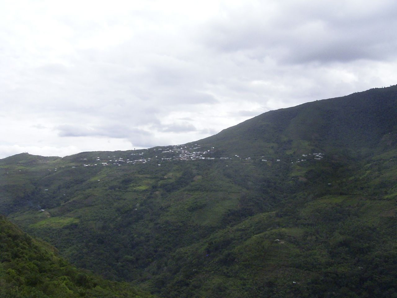 Ocalli, Luya, Amazonas, Peru